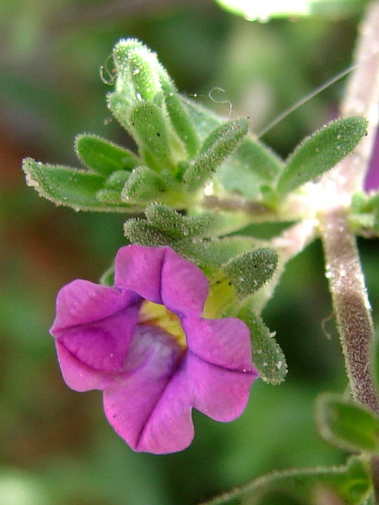 Pétunia à petites fleurs, Calibrachoa parviflora Maldonado, Uruguay